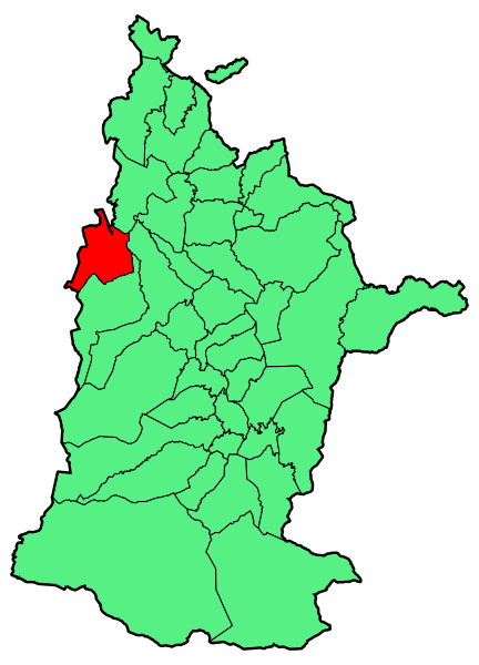 Aipaturiko udalerriaren kokapena Zuberoan